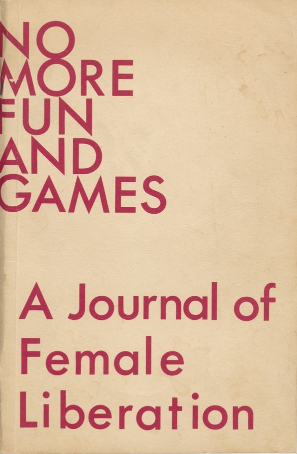 No More Fun and Games. Issue 2